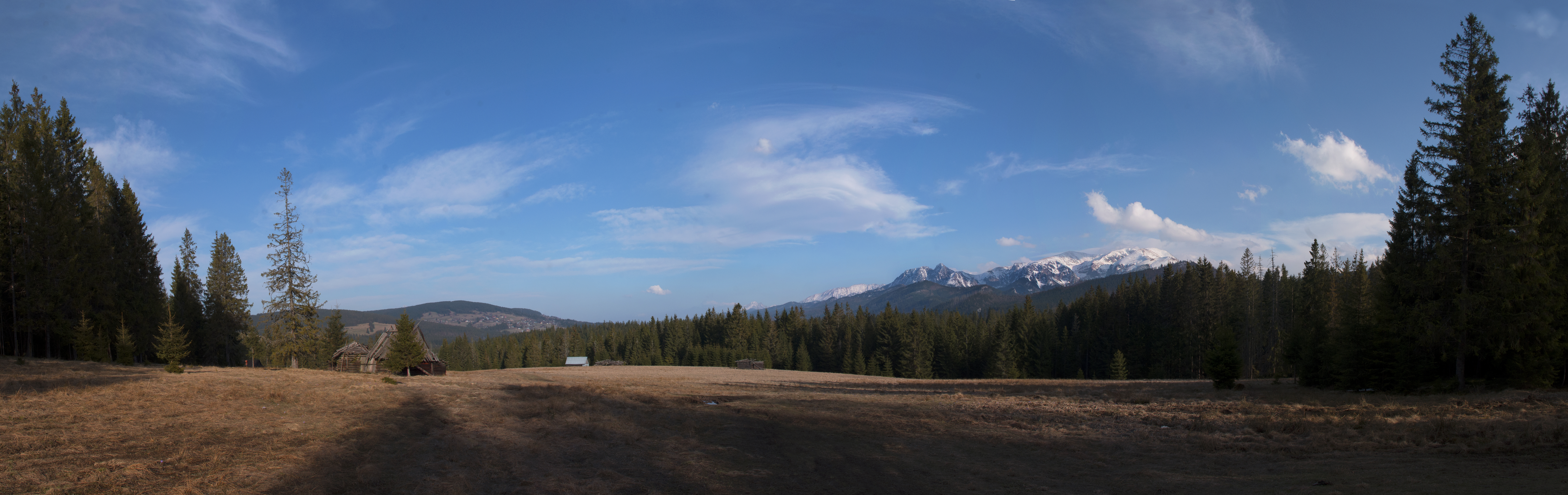 Polana Zdychałówka